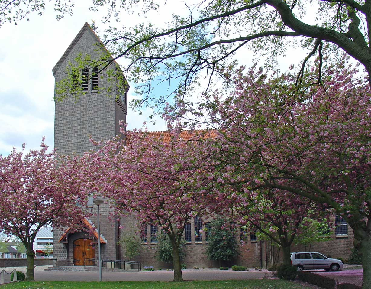 RK Remigiuskerk van Leuth Gelderland